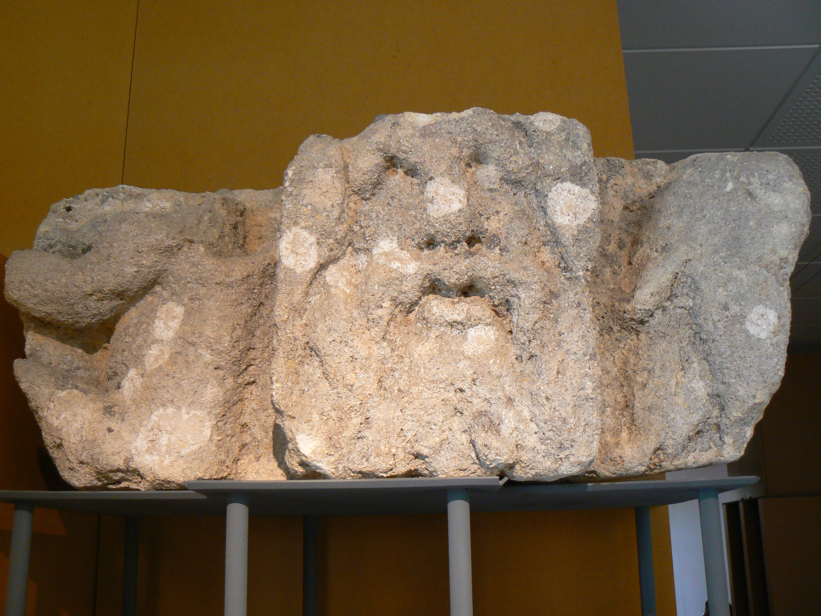 Sculpture en calcaire coquillier représentant le dieu Océan, musée de Jublains